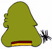 Escudo del municipio de Yecapixtla, Morelos.